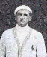 Gustave Buchard, médaillé de bronze à l'épée par équipe aux JO de 1920.